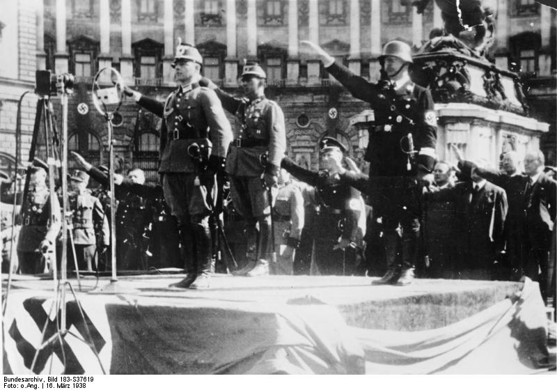 Wien, Vereidigung der Polizei auf Hitler Scherl Die feierliche Vereidigung der österreichischen Polizei auf den Führer Durch den Reichsführer SS und Chef der Deutschen Polizei, Himmler, wurde am Mittwoch [16.3.38] auf dem Heldenplatz in Wien die feierliche Vereidigung der österreichischen Polizei auf den Führer vorgenommen. Unser Bild von der Weihestunde wurde während der Eidesleistung aufgenommen. Rechts Reichsführer SS und Chef der Deutschen Polizei [Heinrich] Himmler. 17.3.1938 Abgebildete Personen: Himmler, Heinrich: Reichsführer der SS, Deutschland (GND 11855123X)